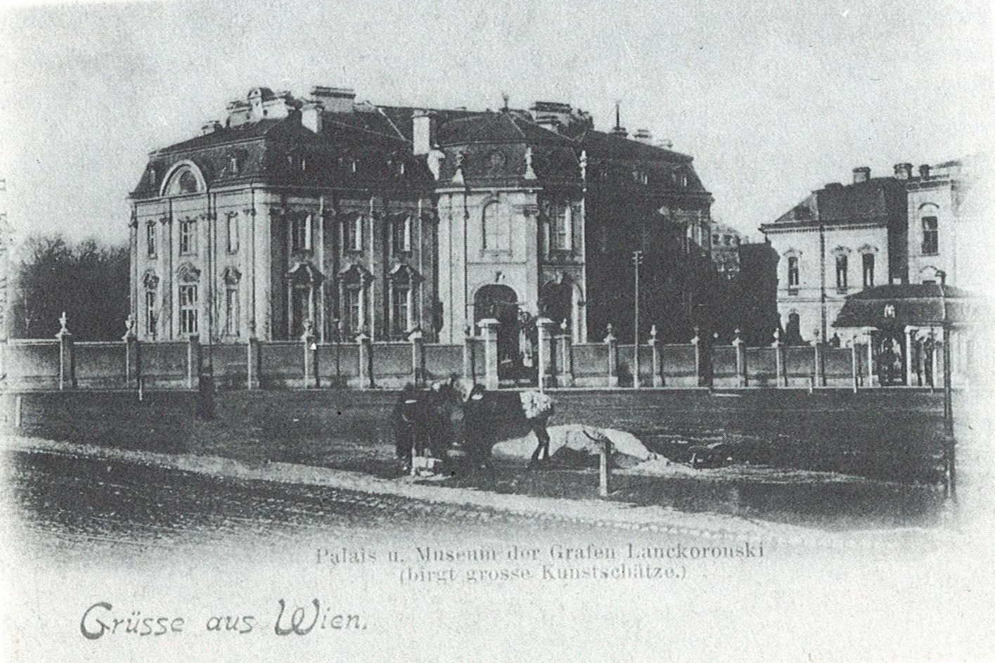 The Palais Lanckoroński in Vienna.